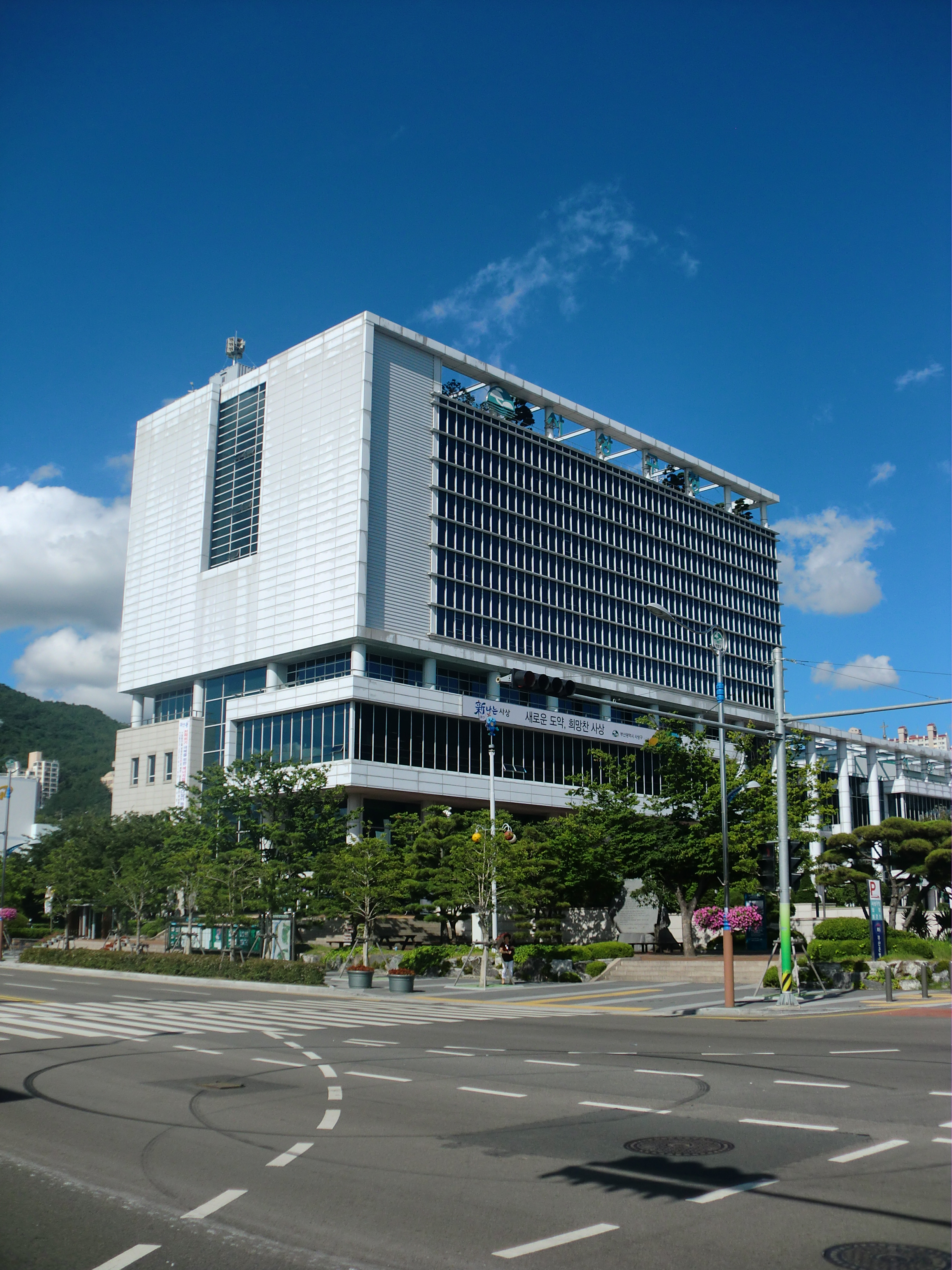 부산광역시 사상구에 있는 사상구청